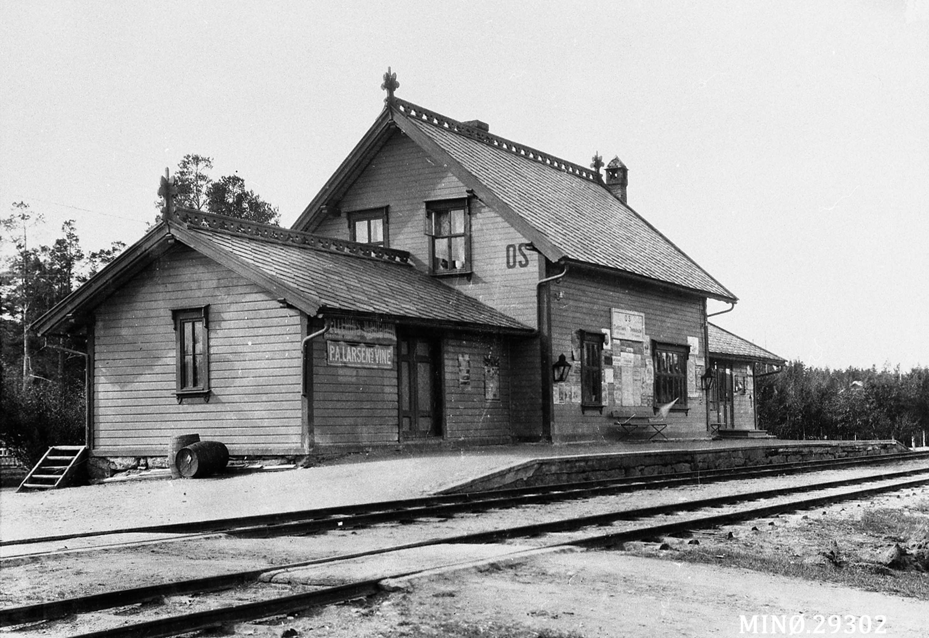 Os stasjon på Rørosbanen anno 1880